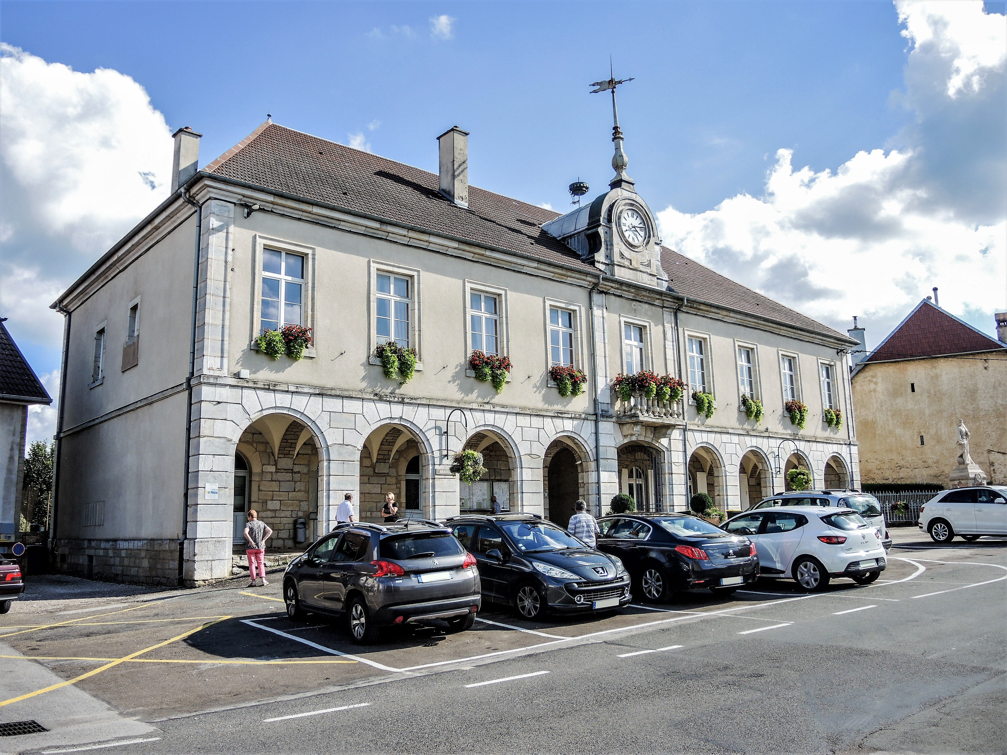 Mairie de Sancey-le-Grand. Doubs